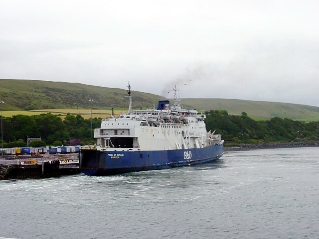 Boat docking at Cairnryan